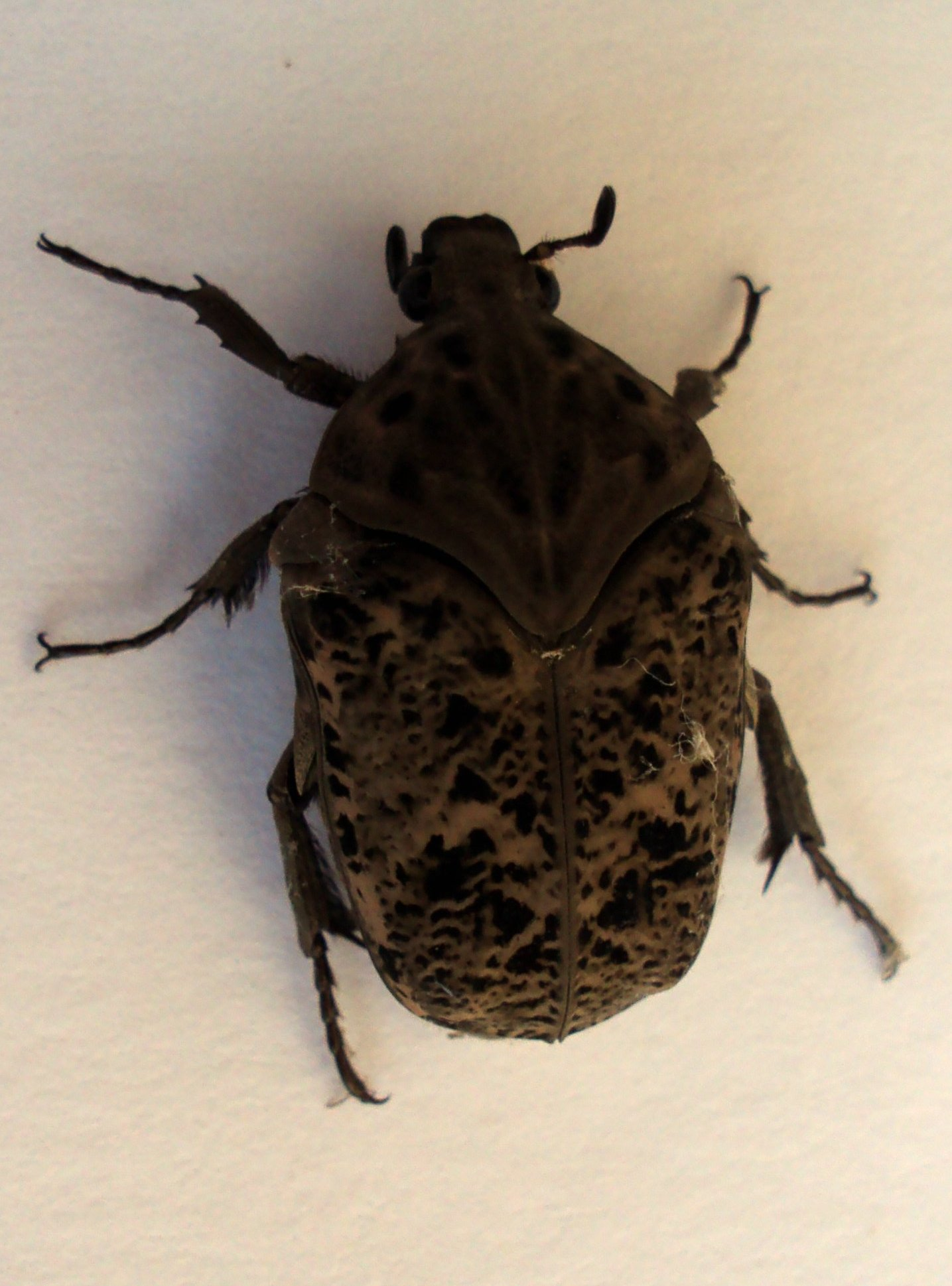 Gymnetis litigiosa (Gory and Percheron, 1833), en Chaco, Argentina